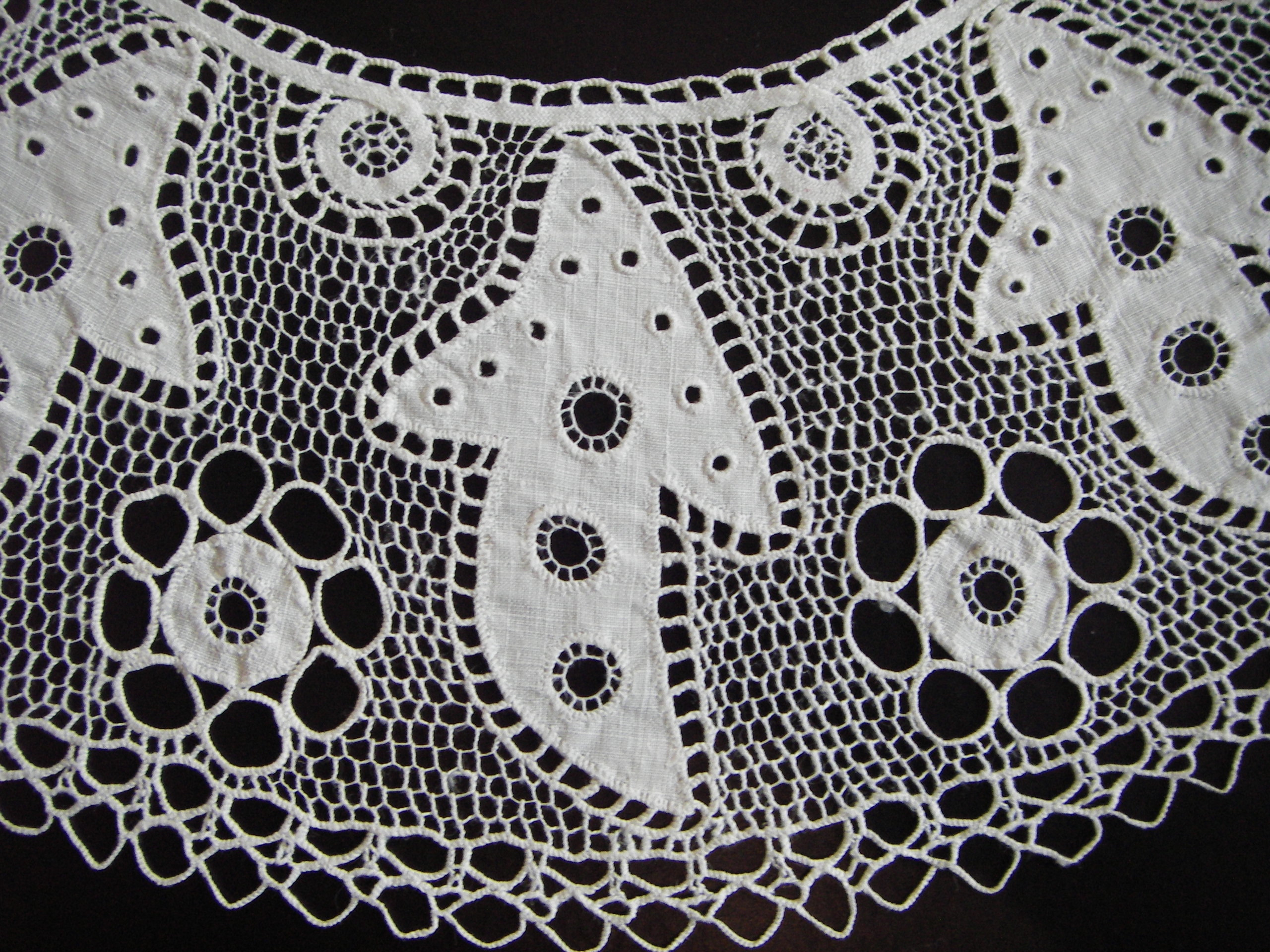 Hedebosyning fra perioden ca. 1855 - 1870